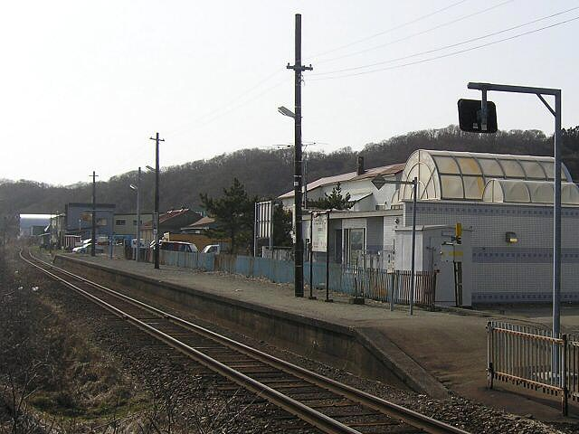 日高幌別駅概観 撮影日 2000年4月9日 撮影場所 日高幌別駅そば草むら 撮影者 投稿者と同じ（Mr-haruka）